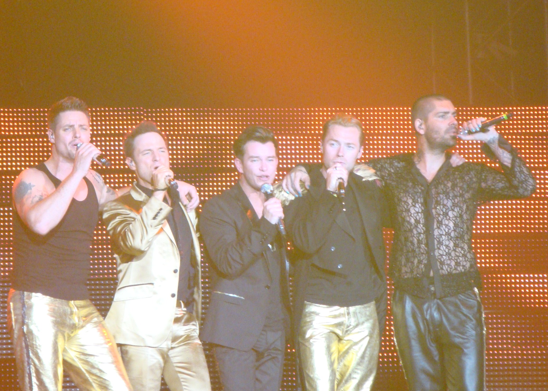 Boyzone